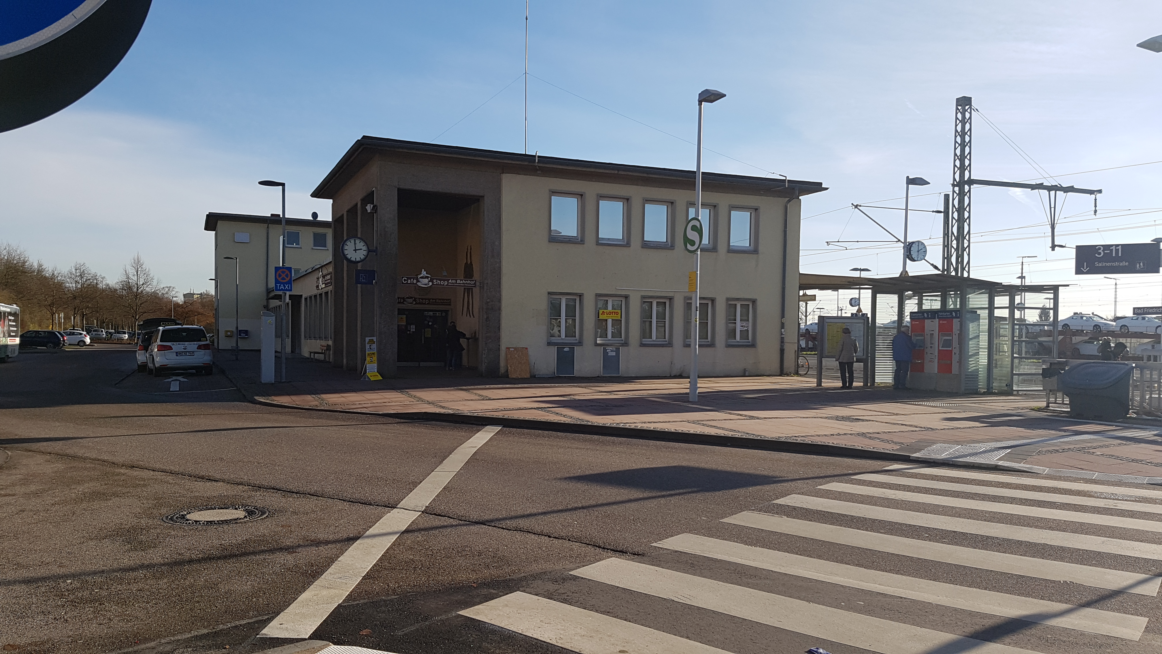 Bad Friedrichshall Hauptbahnhof, Empfangsgebäude, 2017, Blick von Norden